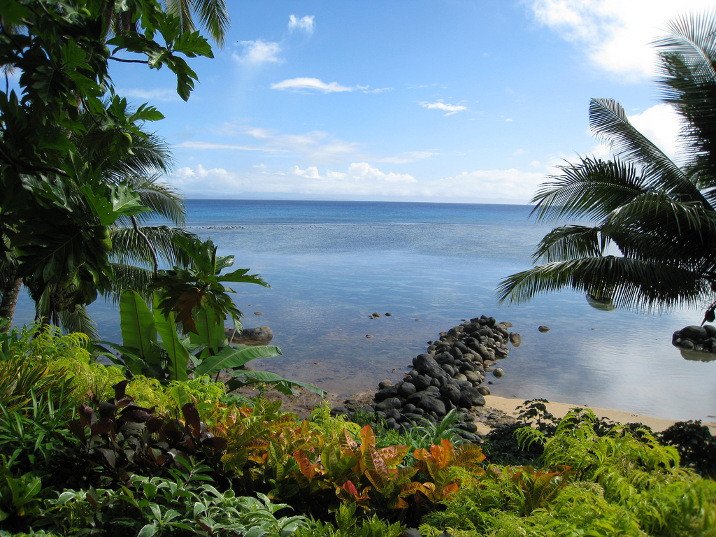 Taveuni coast.